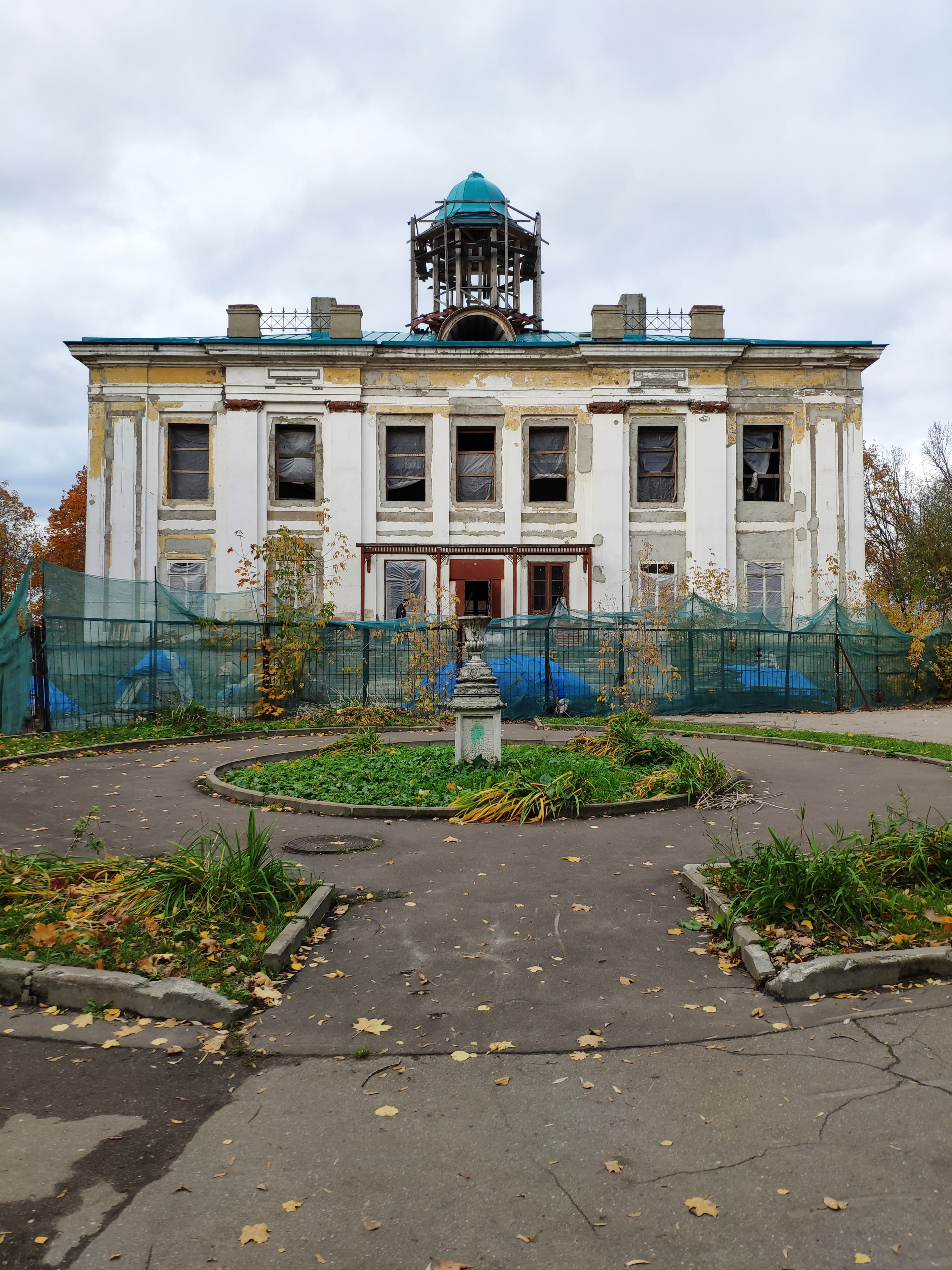 Фасад главного дома усадьбы Кунцево с восстанавливаемым бельведером и площадь перед ним. Идёт процесс реставрации, октябрь 2019.